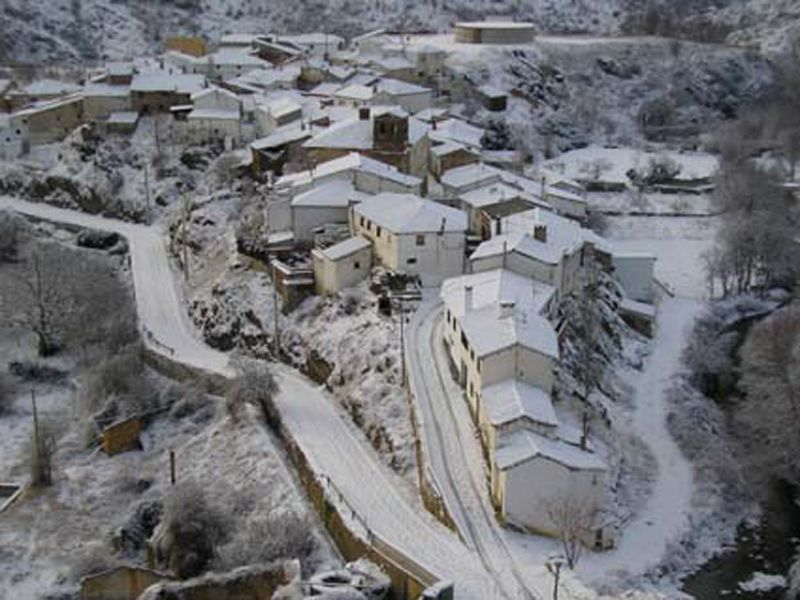 Vista de Cerveruela Nevado